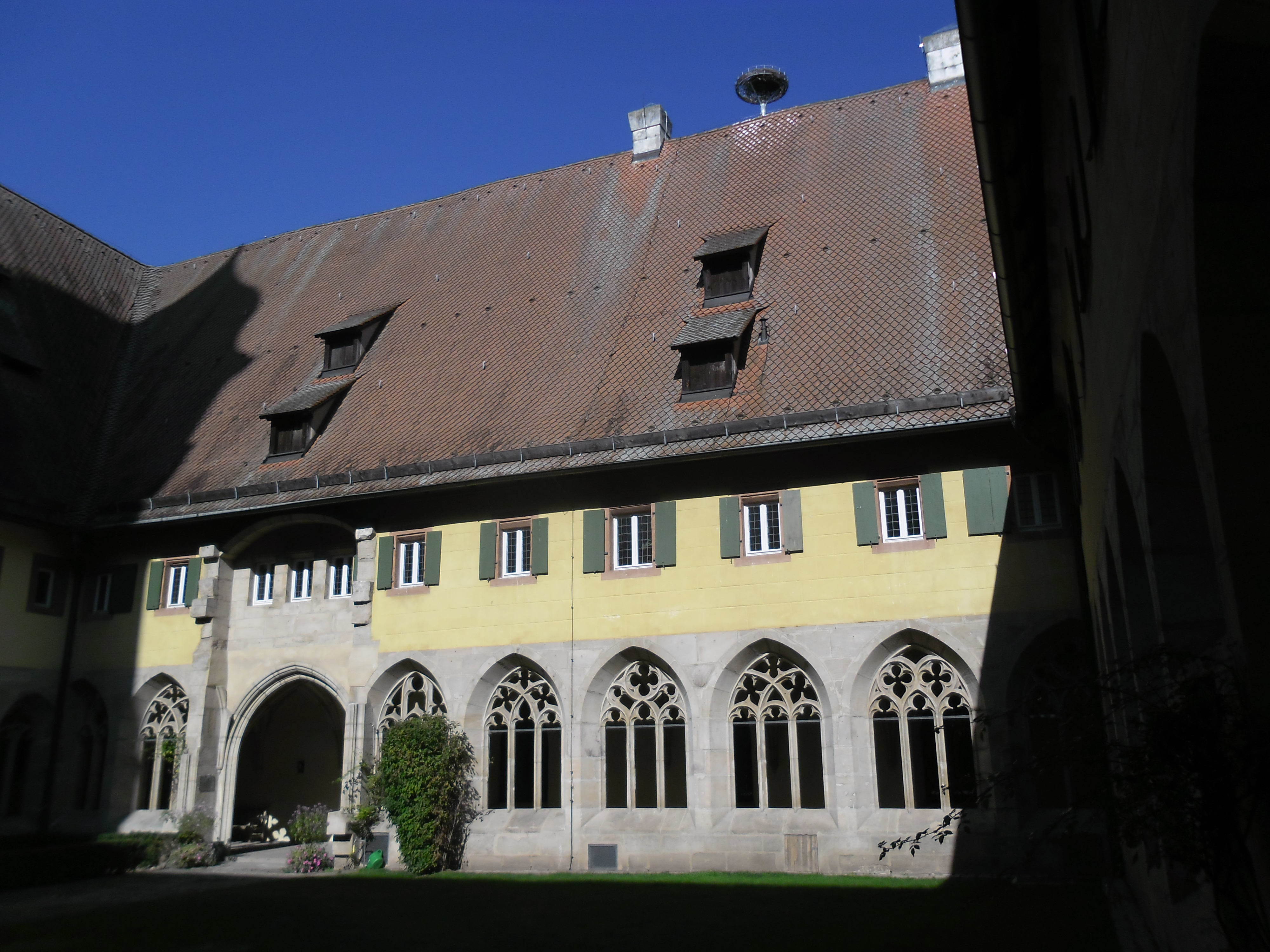 siehe Bildtitel